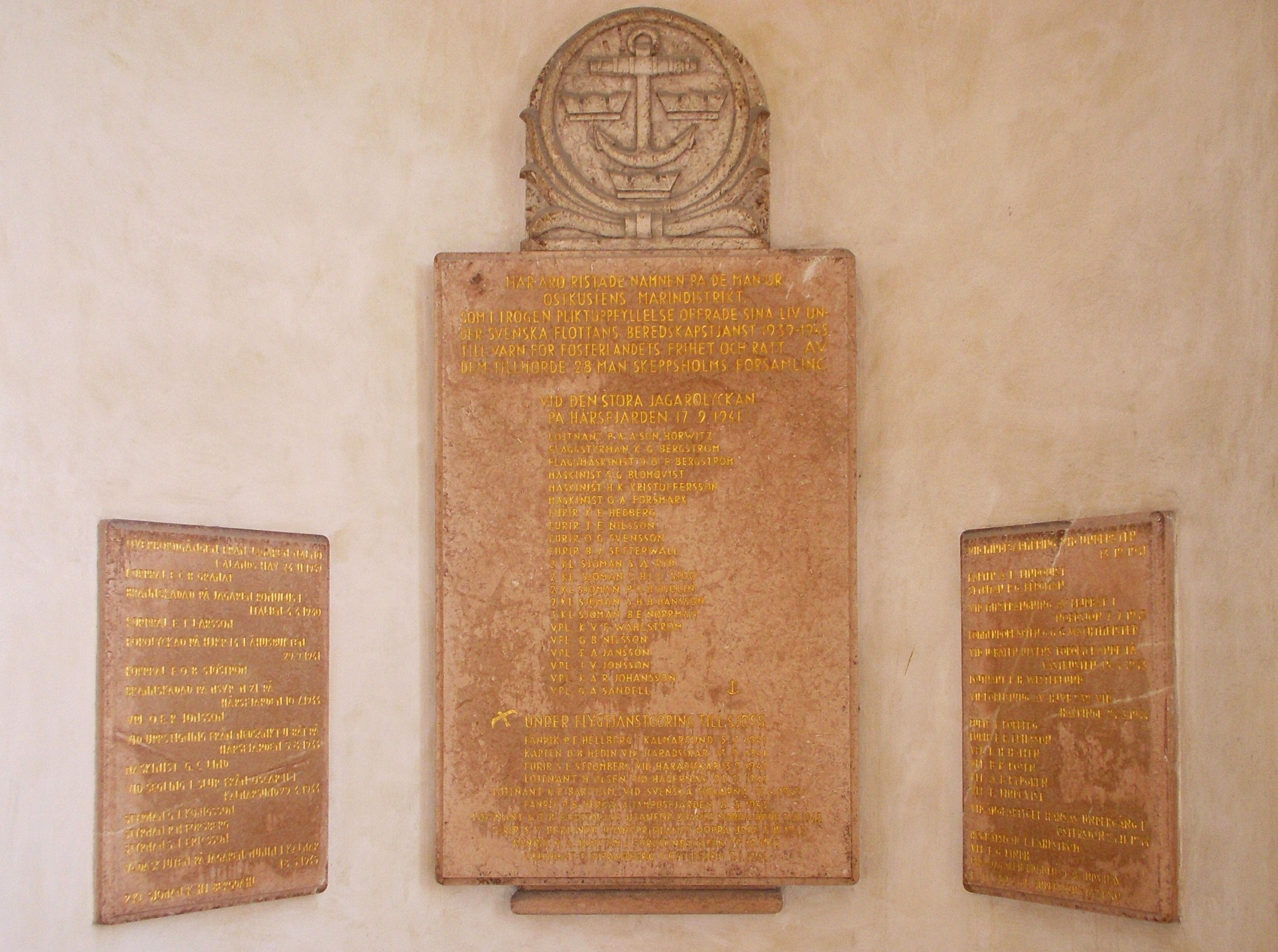 Skeppsholmskyrkan, minnesstenar i entrén över de män ur ostkustens marindistrikt, som offrade sina liv under Svenska Flottans beredskapstjänst 1939-1945 (bl.a. den stora jagarolyckan på Hårsfjärden den 17 september 1941)